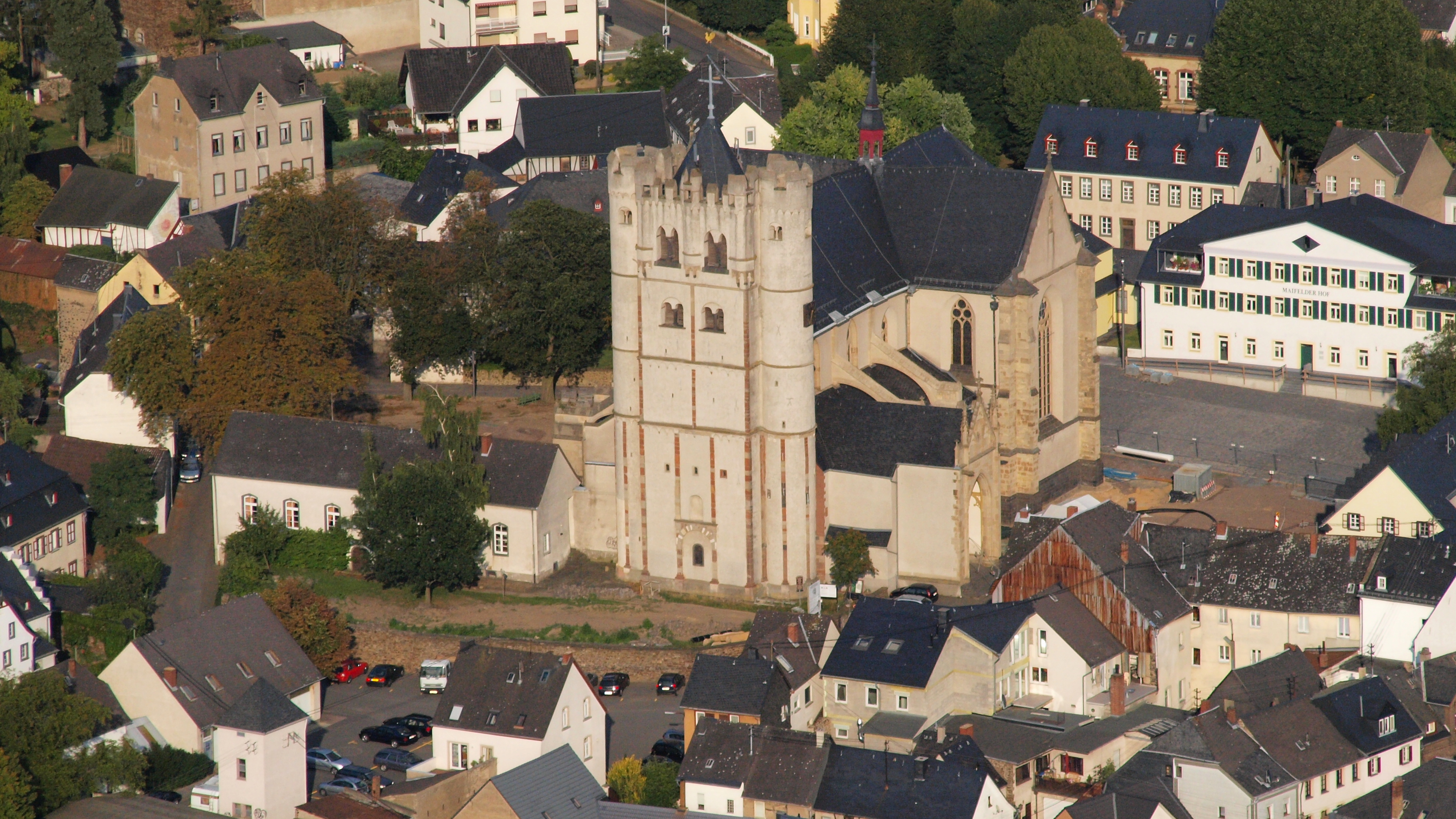 Münstermaifeld, St. Martin und St. Severus: Luftaufnahme